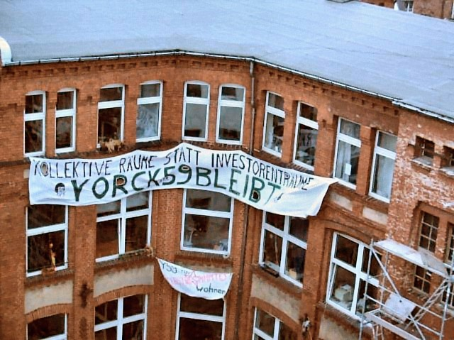 Frontansicht der Yorck59, geschätz Anfang Januar 2005